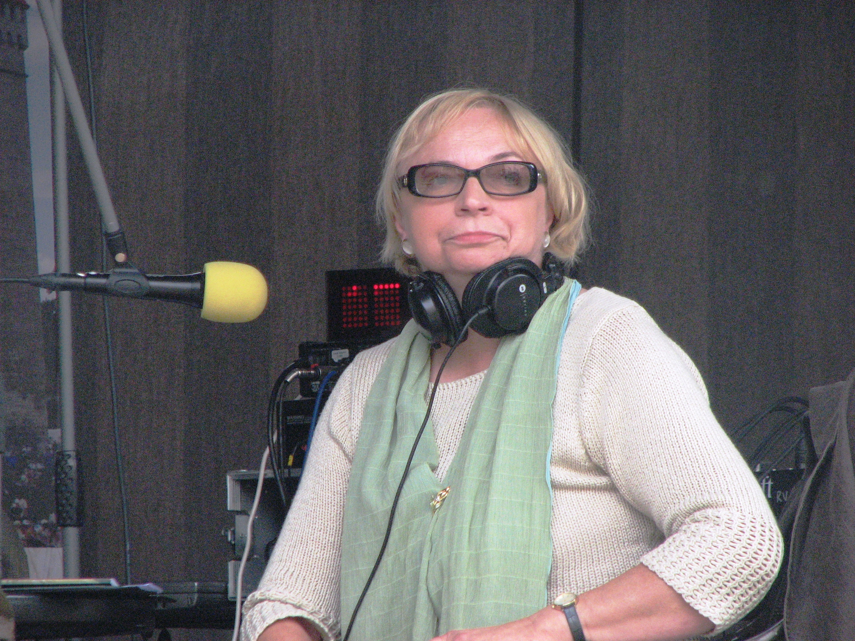 Kaja Kärner Kuressaare Arensburgi ooperikohvikus Vikerraadio otselülituste vahel